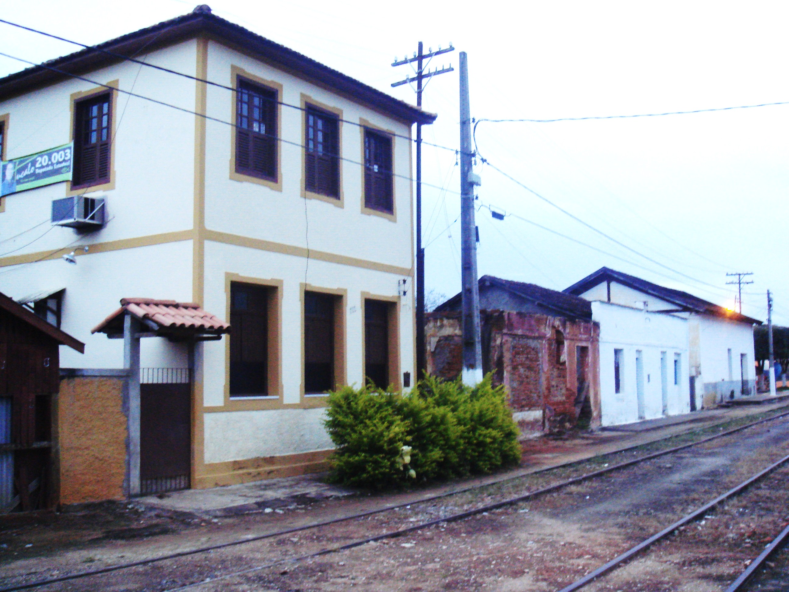 Casarão em Três Irmãos